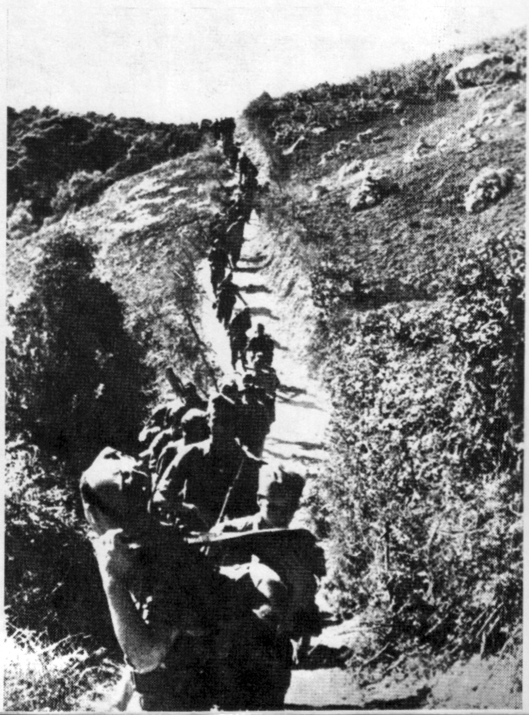 Srpskohrvatski / српскохрватски: Prva dalmatinska brigada na dalmatinskim otocima